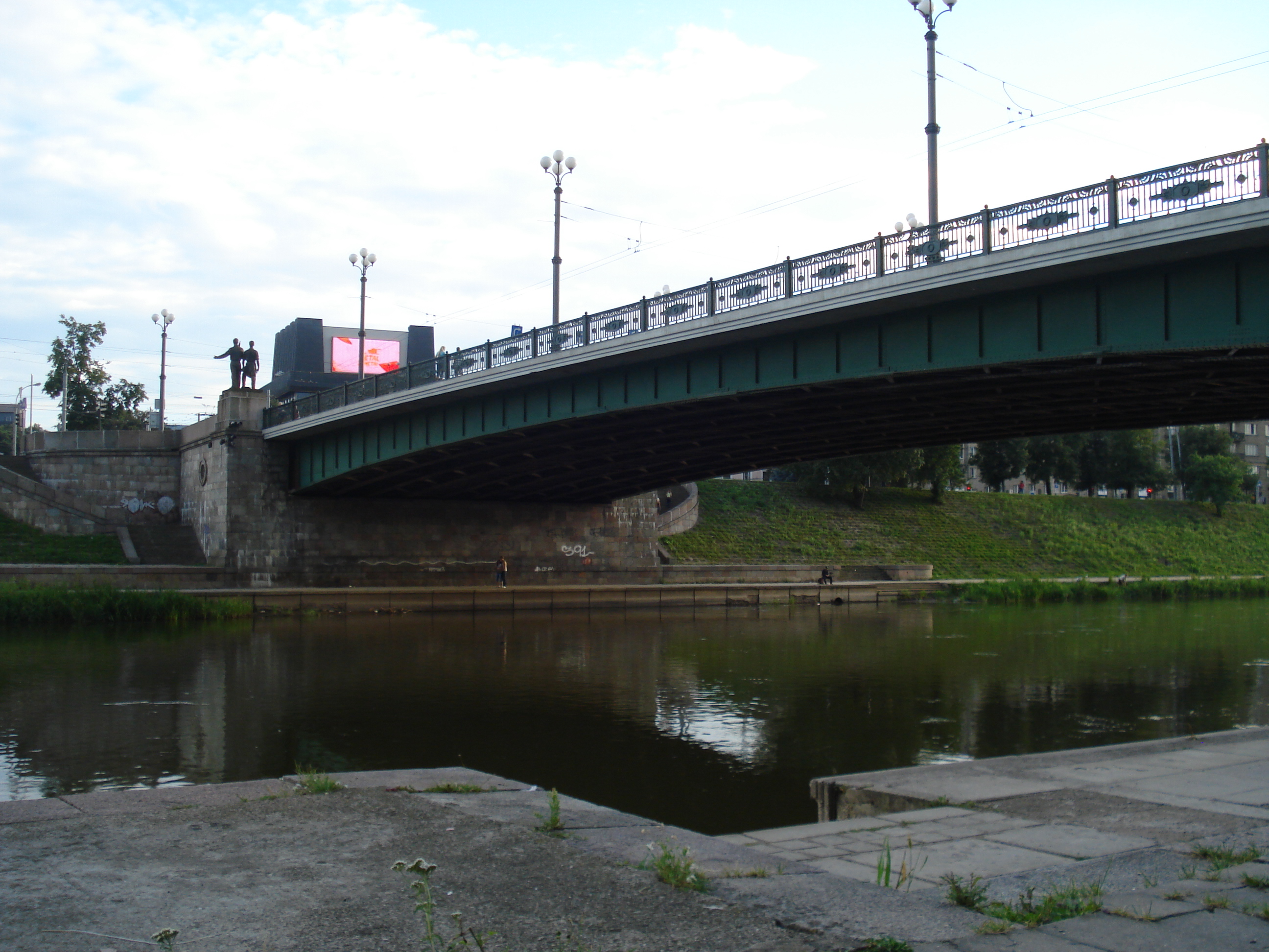 Green Bridge in Vilnius